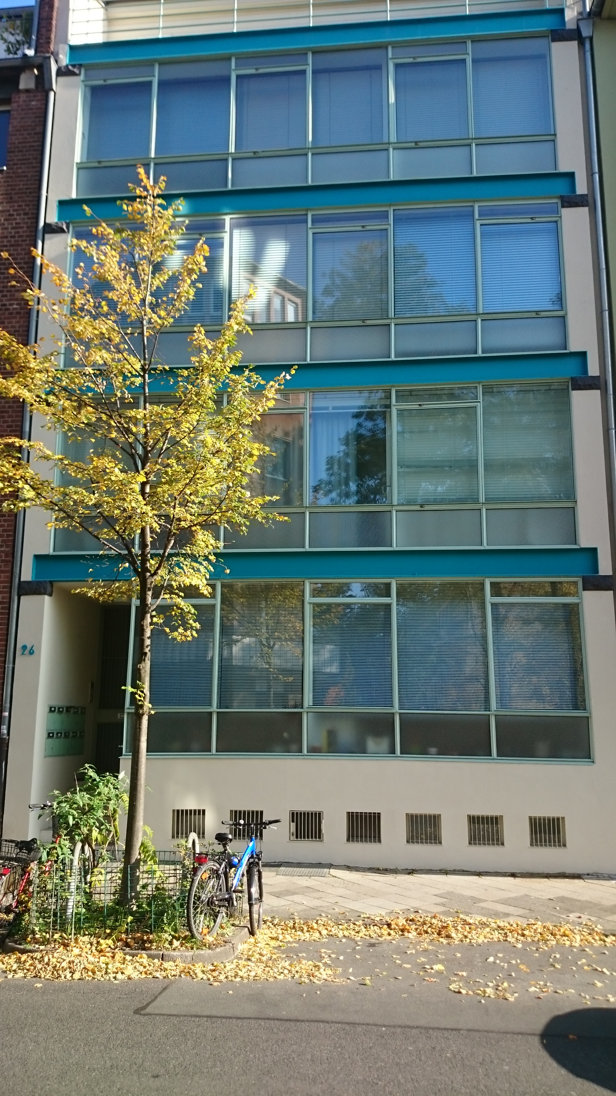 Das Atelierhaus von Bernhard Pfau nach seiner Sanierung. Die Farben sind nun wieder die Originalfarben wie beim Erstanstrich.